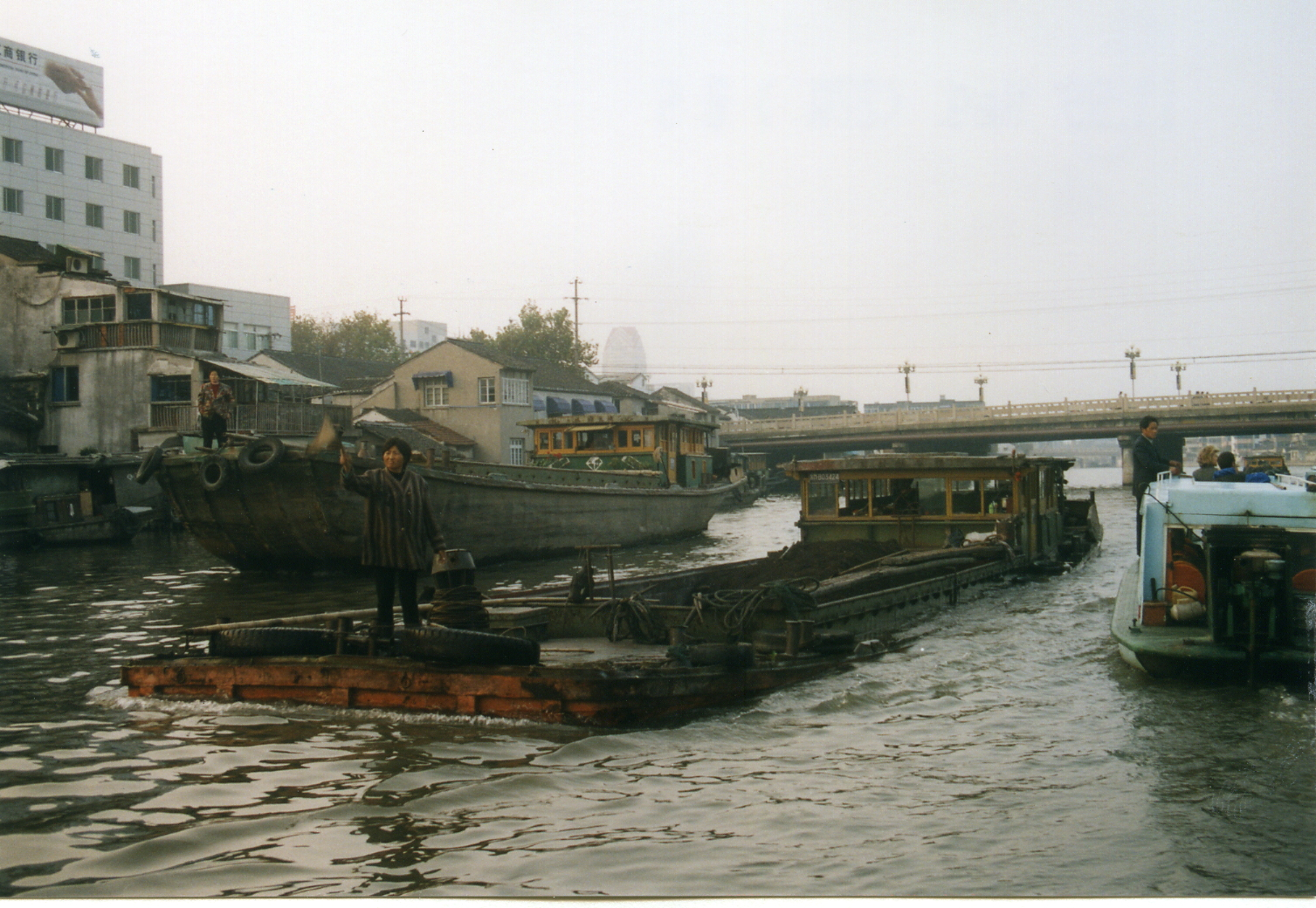 Schiffsverkehr auf dem Kaiserkanal bei Suzhou - Am Bug des Schiffes steht ein Beobachtungs- und Warnposten, oft die Ehefrau des Schiffseigners